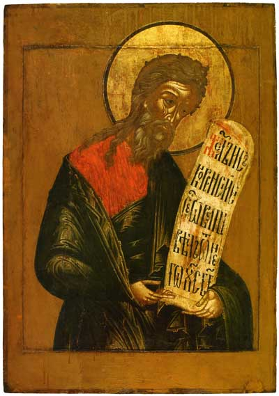 Пророк Иессей. Пророческий чин из главного иконостаса ц. Иоанна Златоуста в Коровниках в Ярославле. Ок. 1654 г. Ярославский историко-архитектурный и художественный музей заповедник, Ярославль, Россия